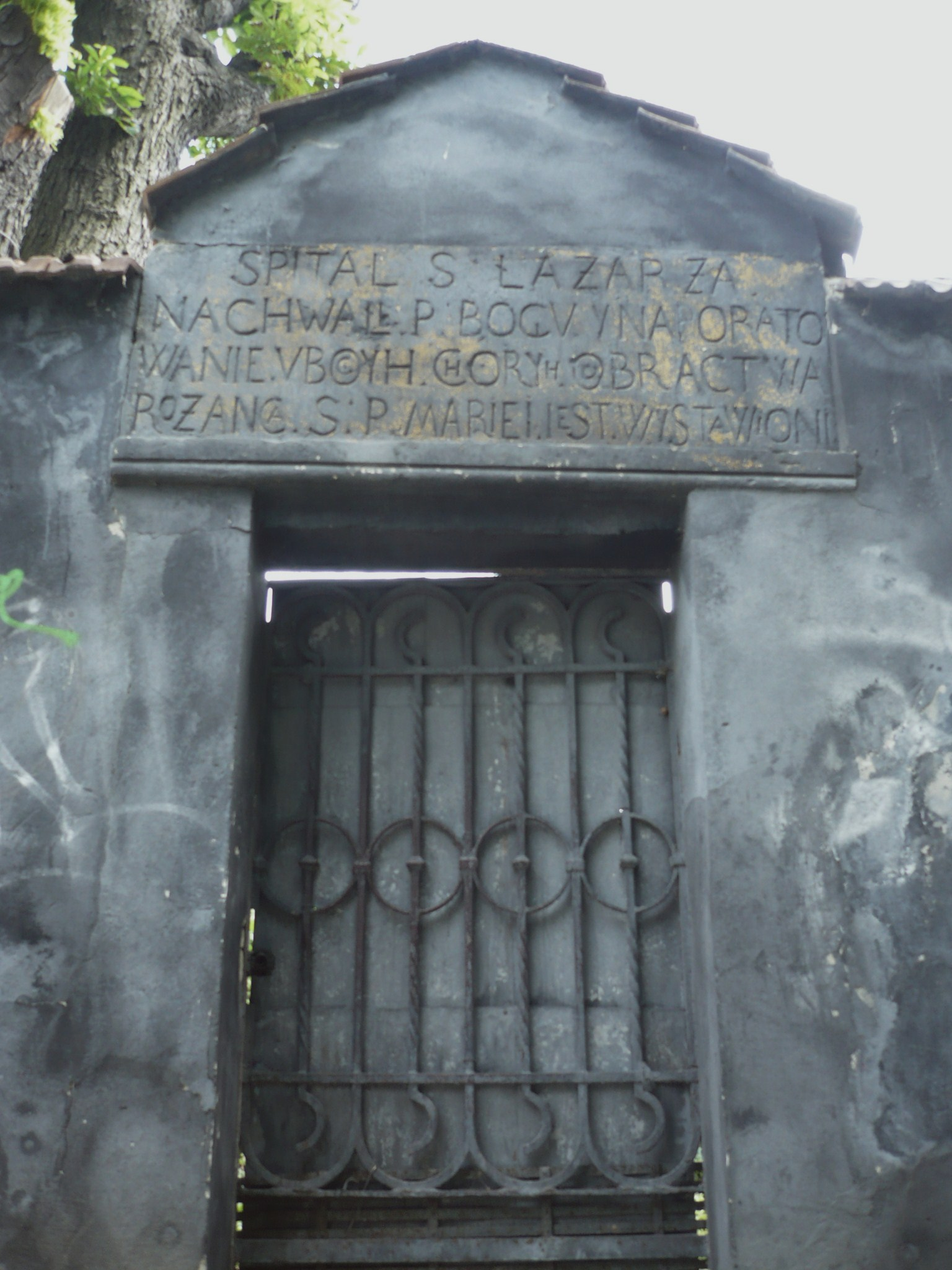 Lwów, ul. Kopernika 27 - Szpital św. Łazarza